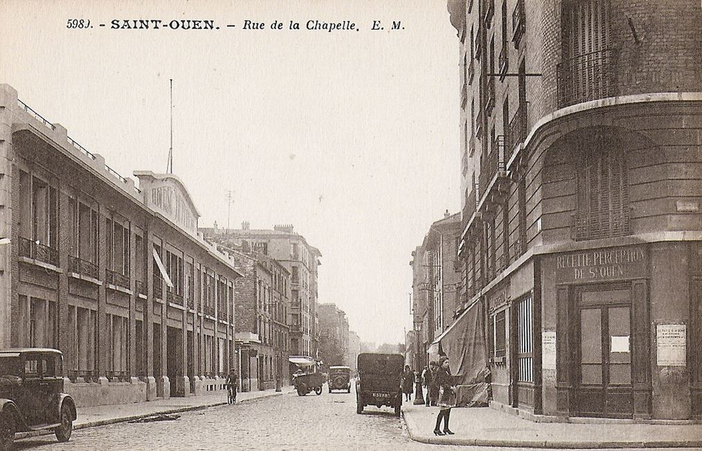 Saint-Ouen. Rue de la Chapell, aujourd'hui rue du Docteur-Bauer. A droite, l'angle rue Dieumegard